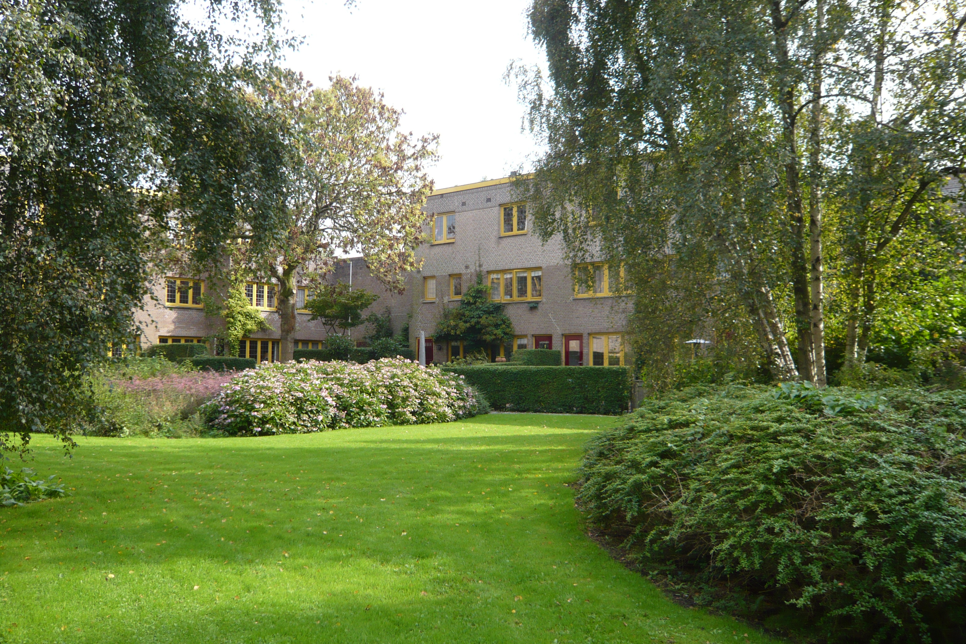 Westerlijk deel van park Tuinwijk, Haarlem.